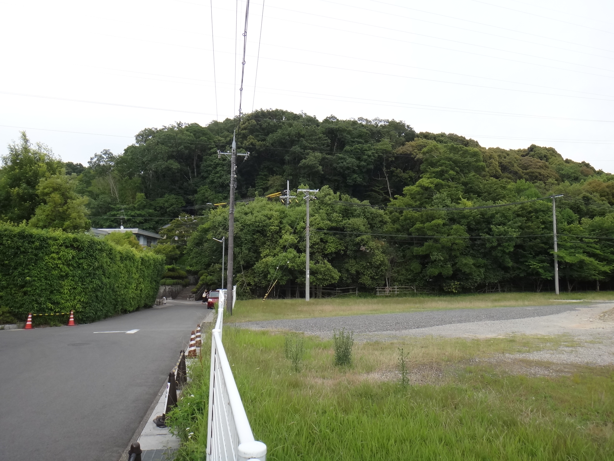 宇治市朝日山頂